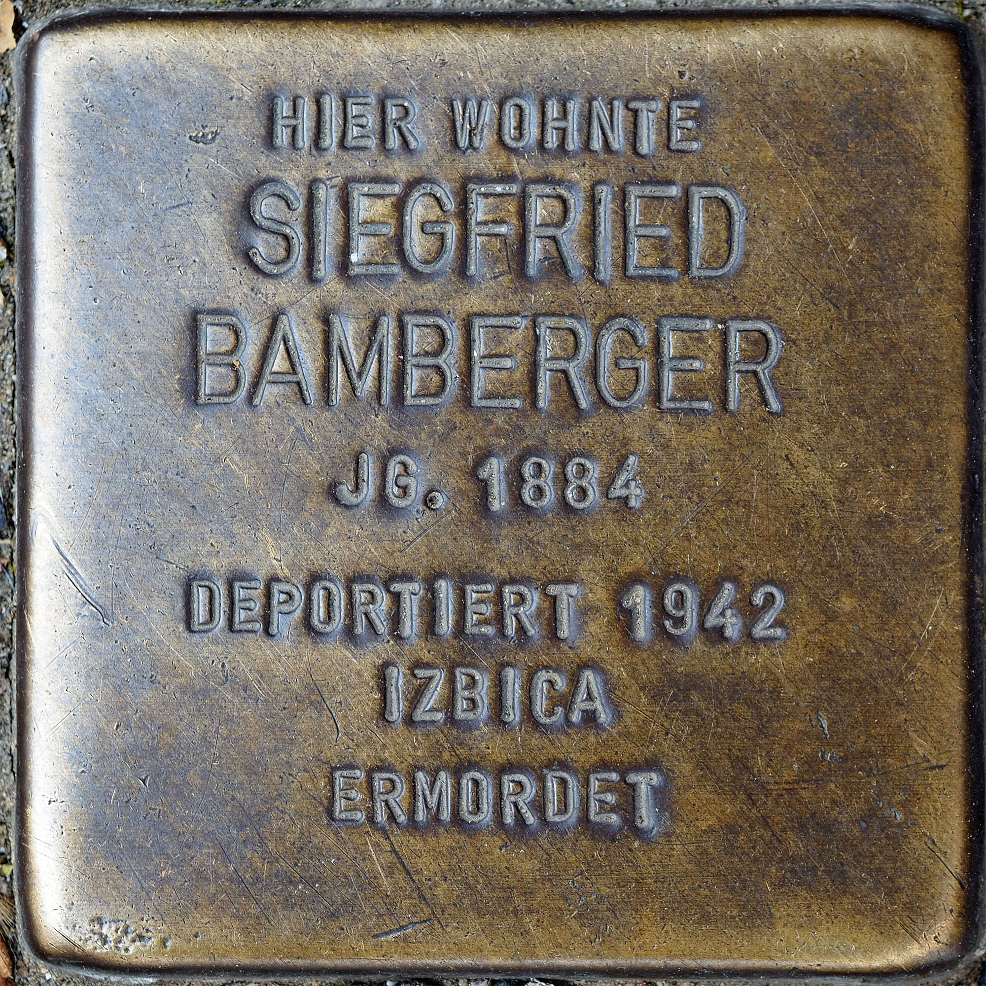 Stolpersteine MG: Bamberger, Siegfried